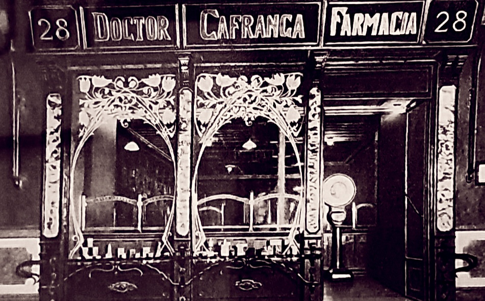 Botica del Doctor Cafranga en el siglo XIX. Actualmente Farmacia Central, Calle Larga, 28 de Jerez de la Frontera (Cádiz).